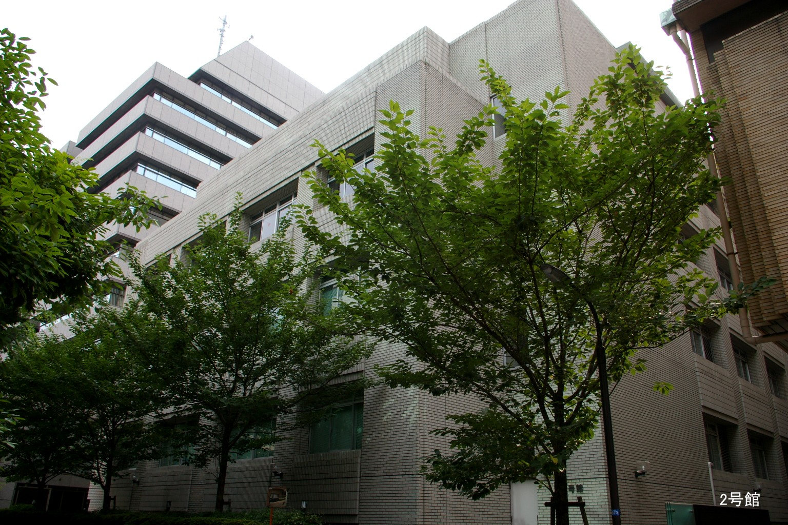 2009.4東京都港区で塾生 (talk)が撮影